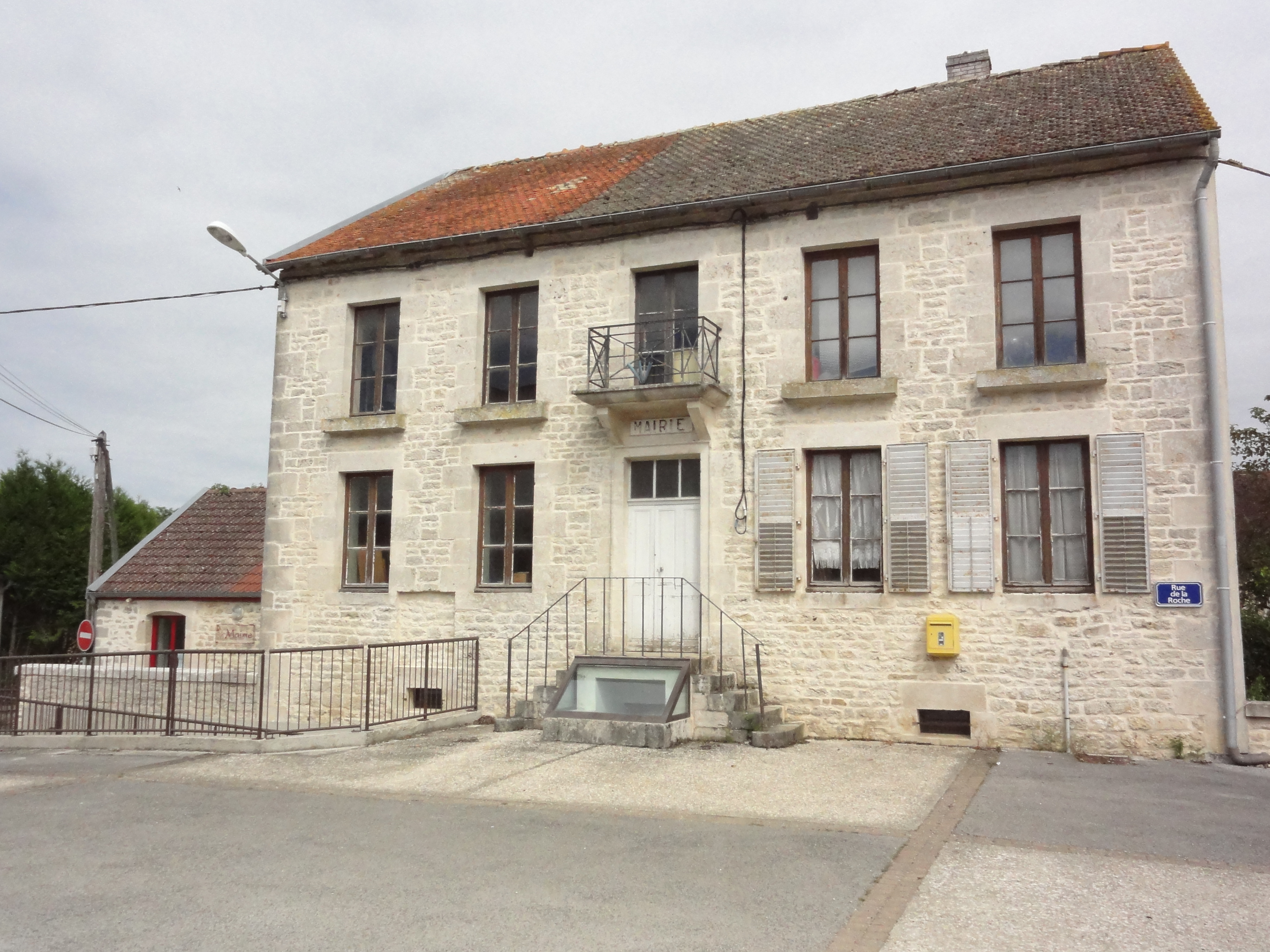 Rochefort-sur-la-Côte (Haute-Marne) mairie - école